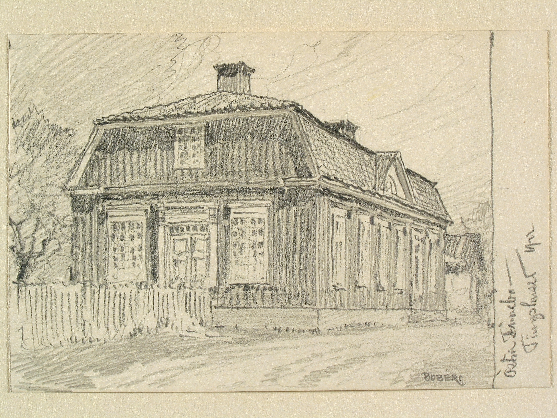 Gästrikland, Österfärnebo, tingshuset. Teckning av Ferdinand Boberg. Depicted place: Q10727851 (Q10727851)